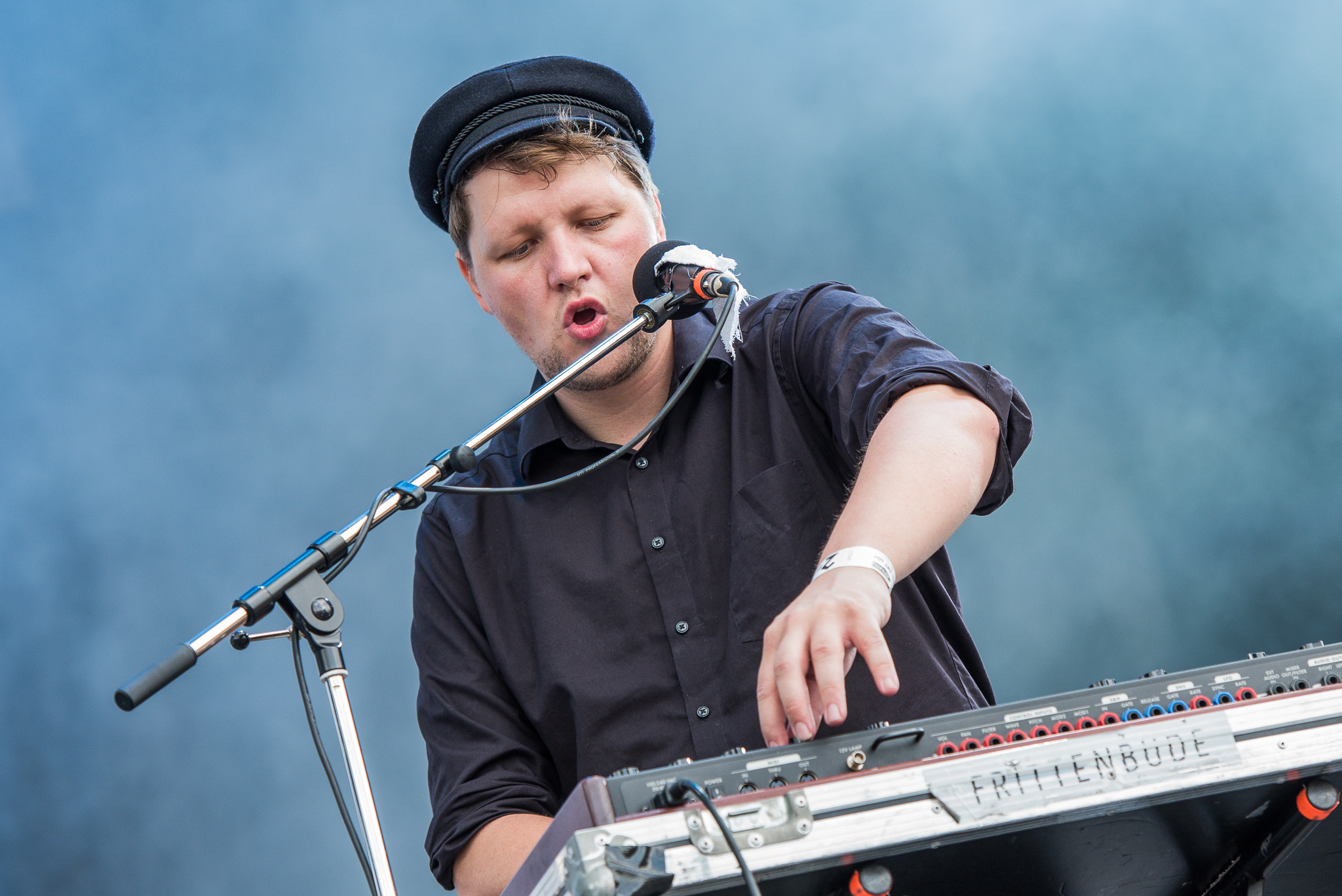 ARGO-Konzerte,Beck's Park Stage,Festival,Frittenbude,Jakob Häglsperger,Konzert,Livekonzert,Livemusik,Musik,RiP,Rock im Park 2016